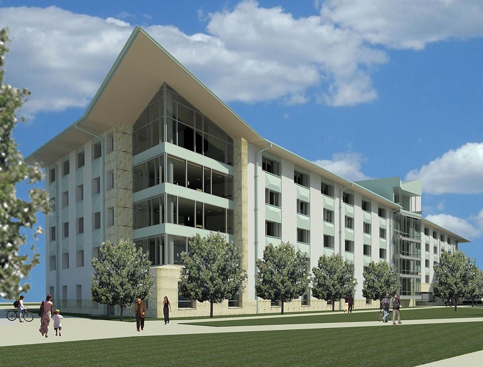 Архітектурна візуалізація нового корпусу гуртожитку-колегіуму в Академічному містечку УКУ